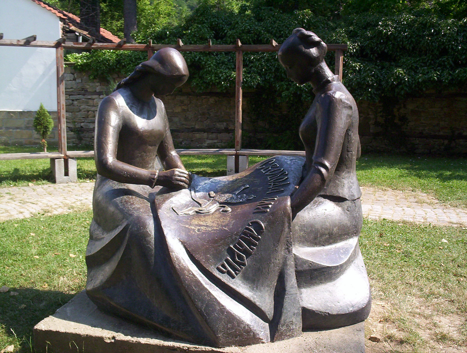 Райна Княгиня